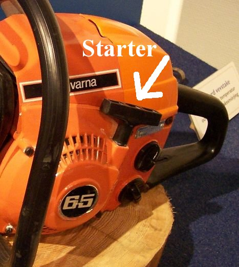 Seilzugstarter einer Husqvarna-Motorsäge